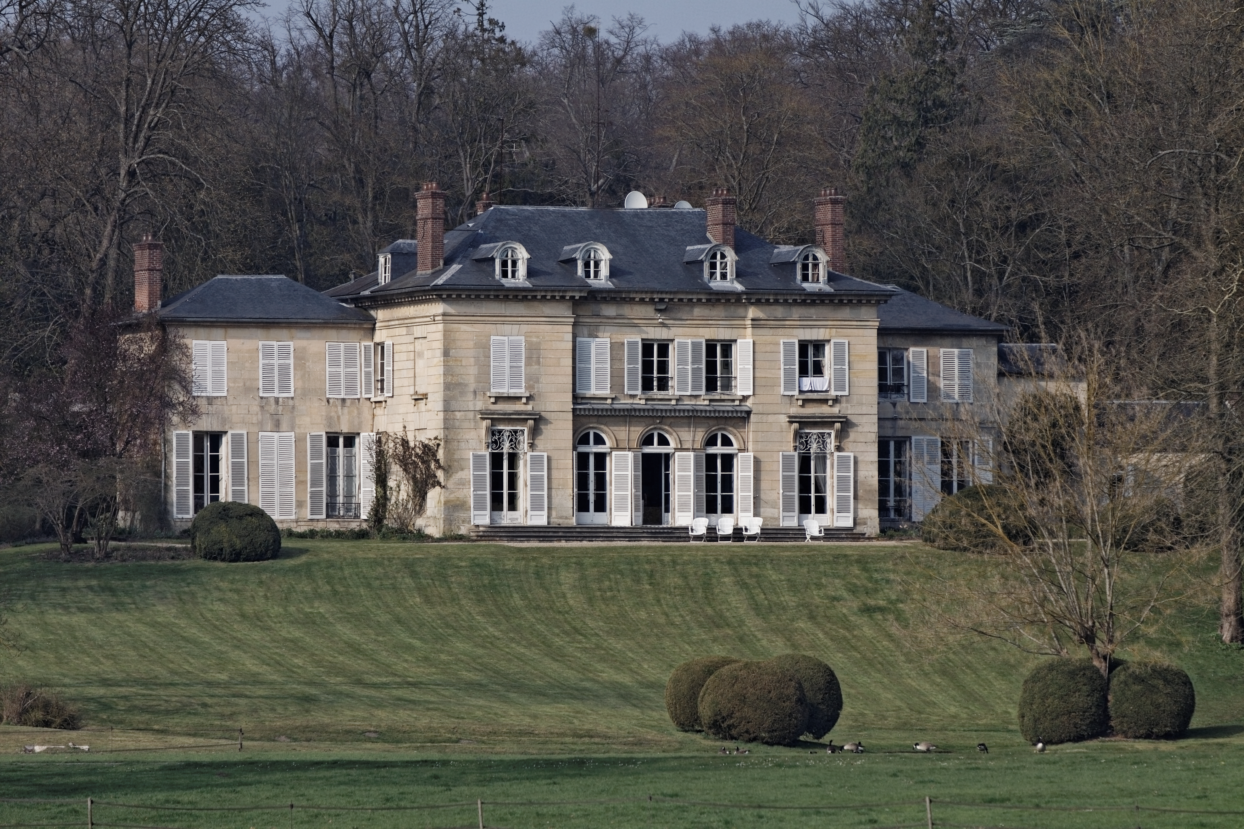 Le château de Saint-Firmin vu du parc du château de Chantilly.